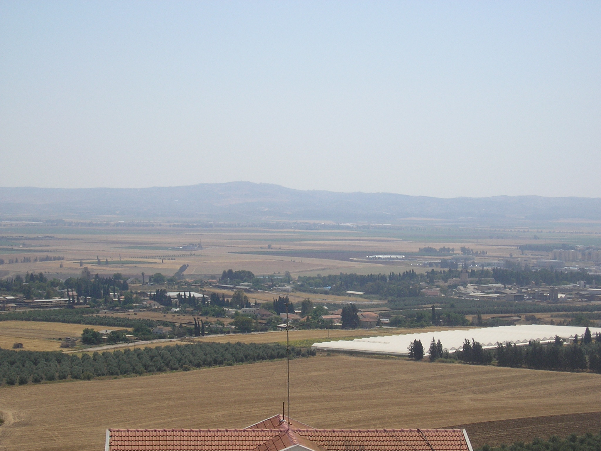 השדות בין עפולה ומרחביה בהם לחם נפוליון בקרב מול הר תבור - the fields between Afula and Merhavia, where Napoléon fought in the battle near Tabor mountain